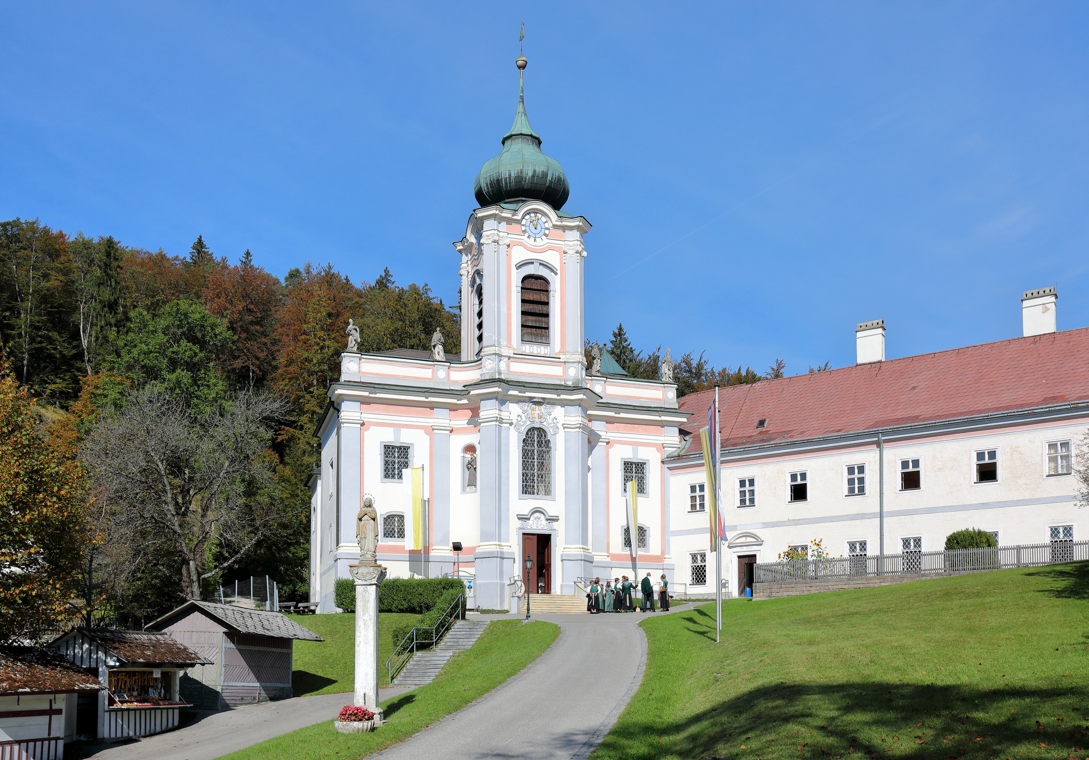 Der Weiler und Wallfahrtsort Mariahilfberg in der niederösterreichischen Marktgemeinde Gutenstein.In der Bildmitte die Kloster- und Wallfahrtskirche Hilfreiche Jungfrau Maria. Diese Kirche wurde anstelle einer 1705 abgebrannten Kirche in vergrößerter Form von 1710 bis 1721 neu errichtet. Rechts das im stumpfen Winkel angebaute Servitenkloster, das 1672 von Johann Balthasar II. von Hoyos (1626–1681) gestiftet wurde. Links im Bild Devotionalien-Verkaufsstände und eine Maria-Immaculata-Statue aus dem 19. Jahrhundert auf einem Schaft mit Kapitell um 1700.